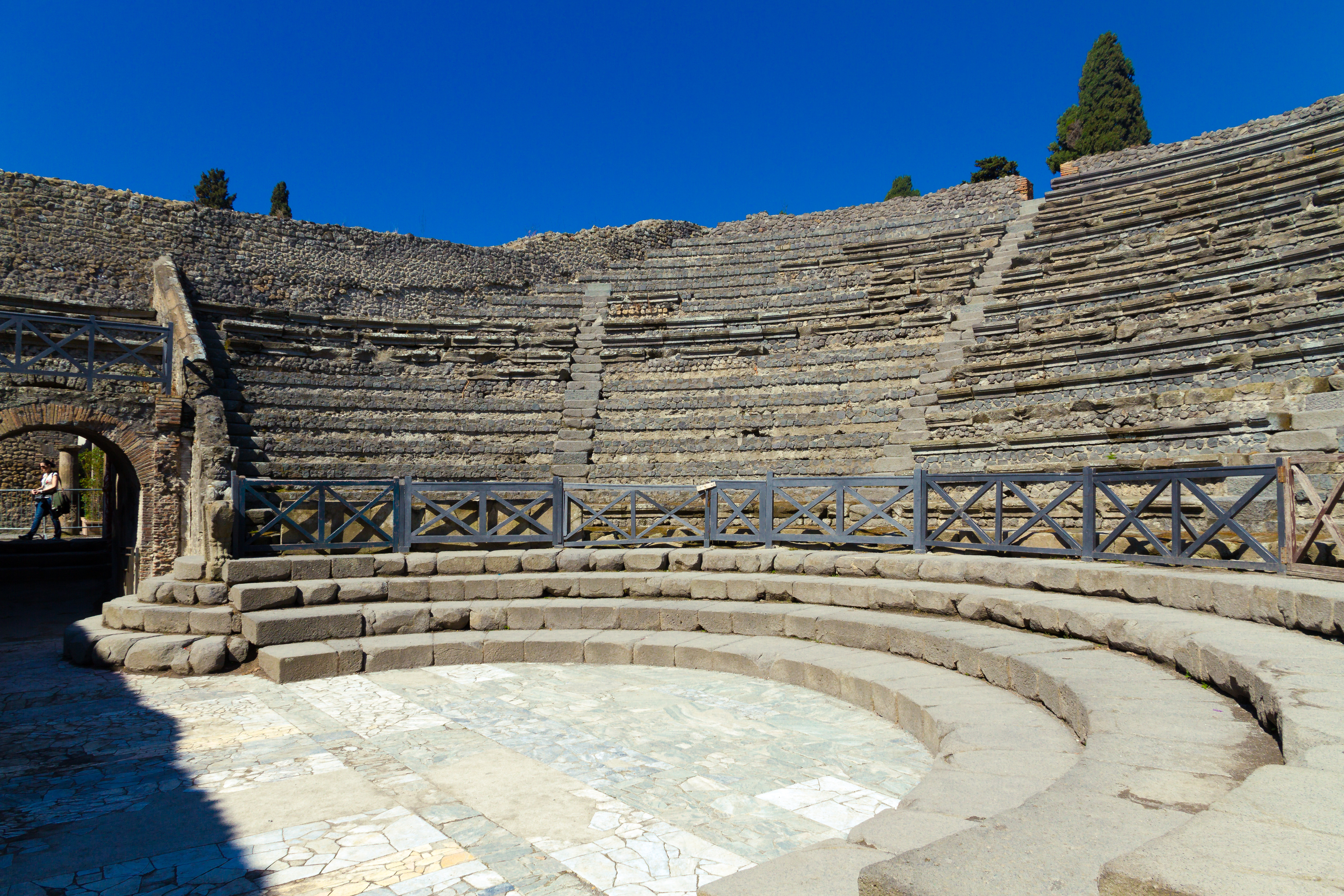 Pompeii-Theatre